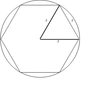 Figura auxiliar per al càlcul de les funcions trigonomètriques de 30º